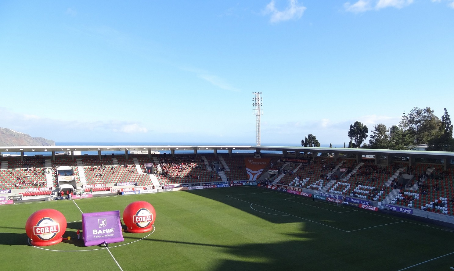 Vistas panorâmicas do estádio dos Barreiros sobre o Oceano Atlantico